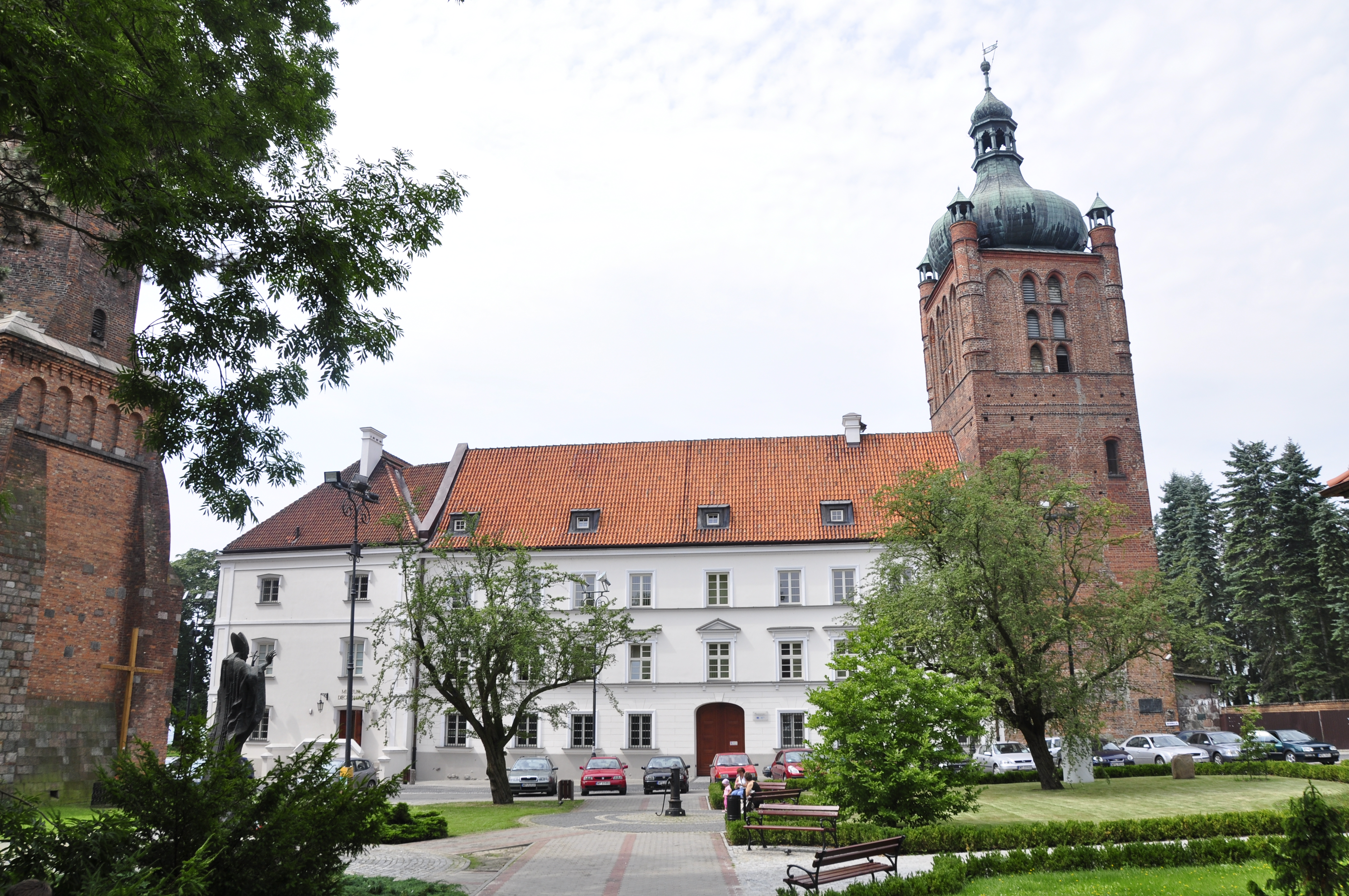 Plock